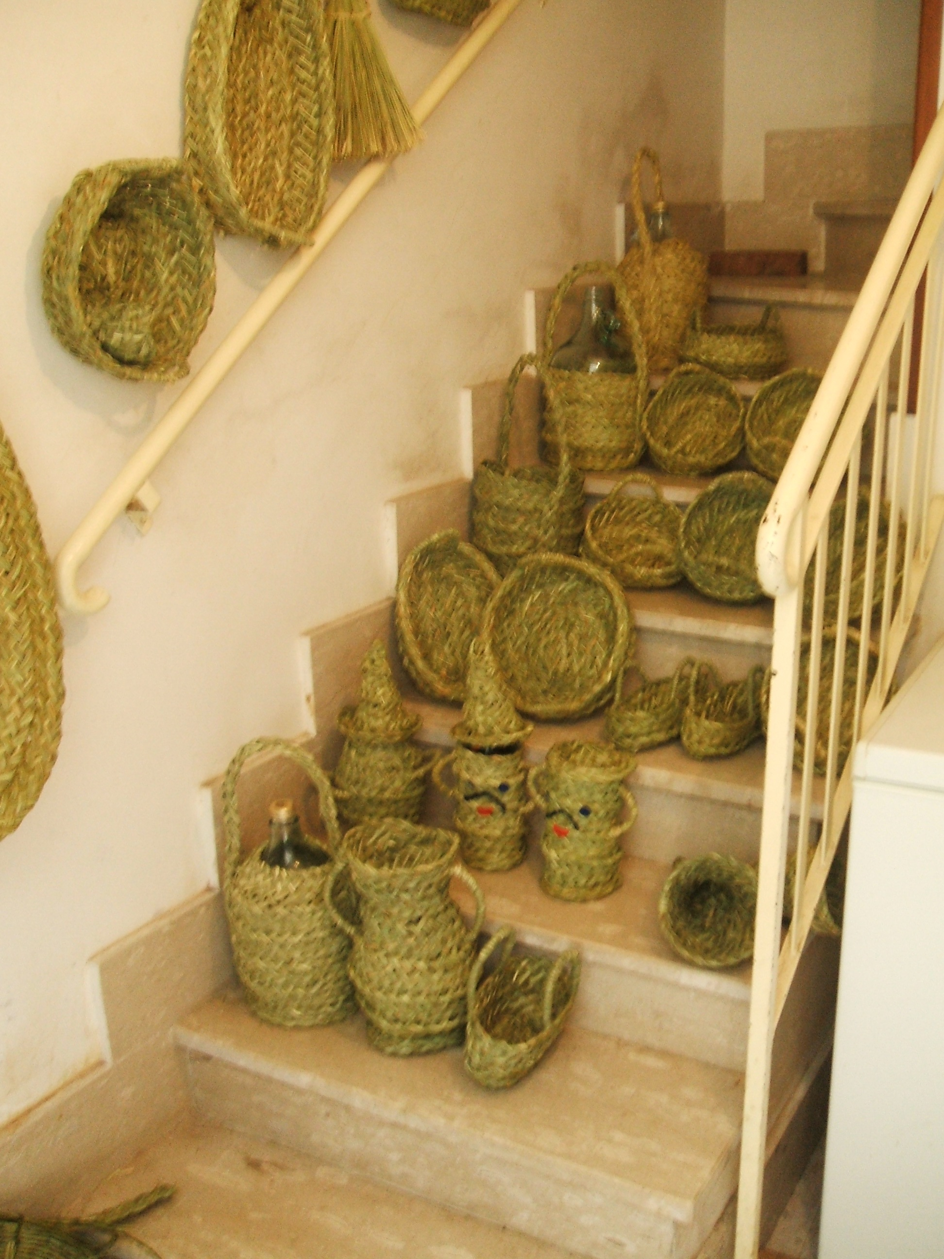 Stramma handmade products, typical of Ventosa (Santi Cosma e Damiano, LT).